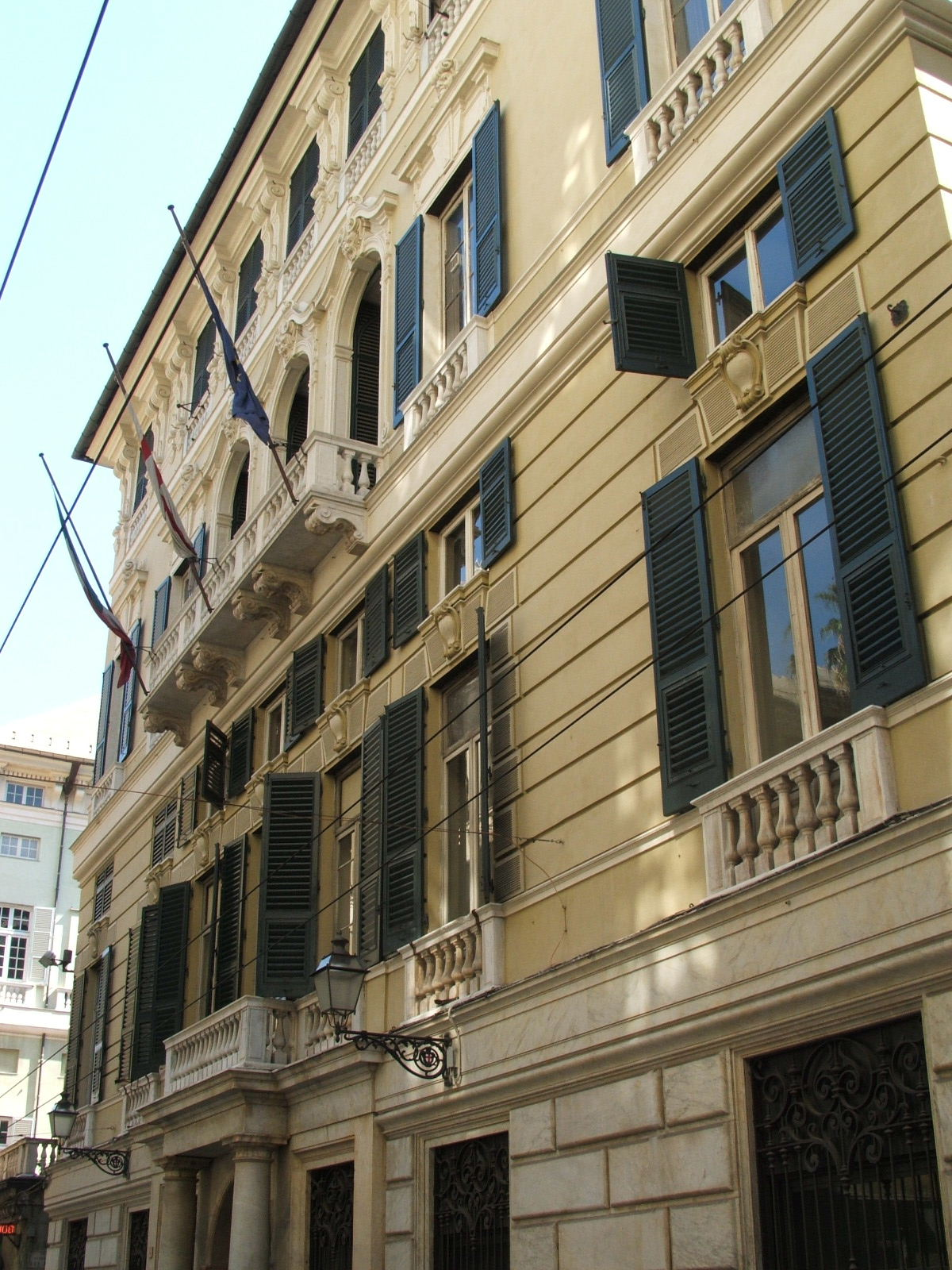 Immagine dalla città di Genova Via Balbi, sede universitaria